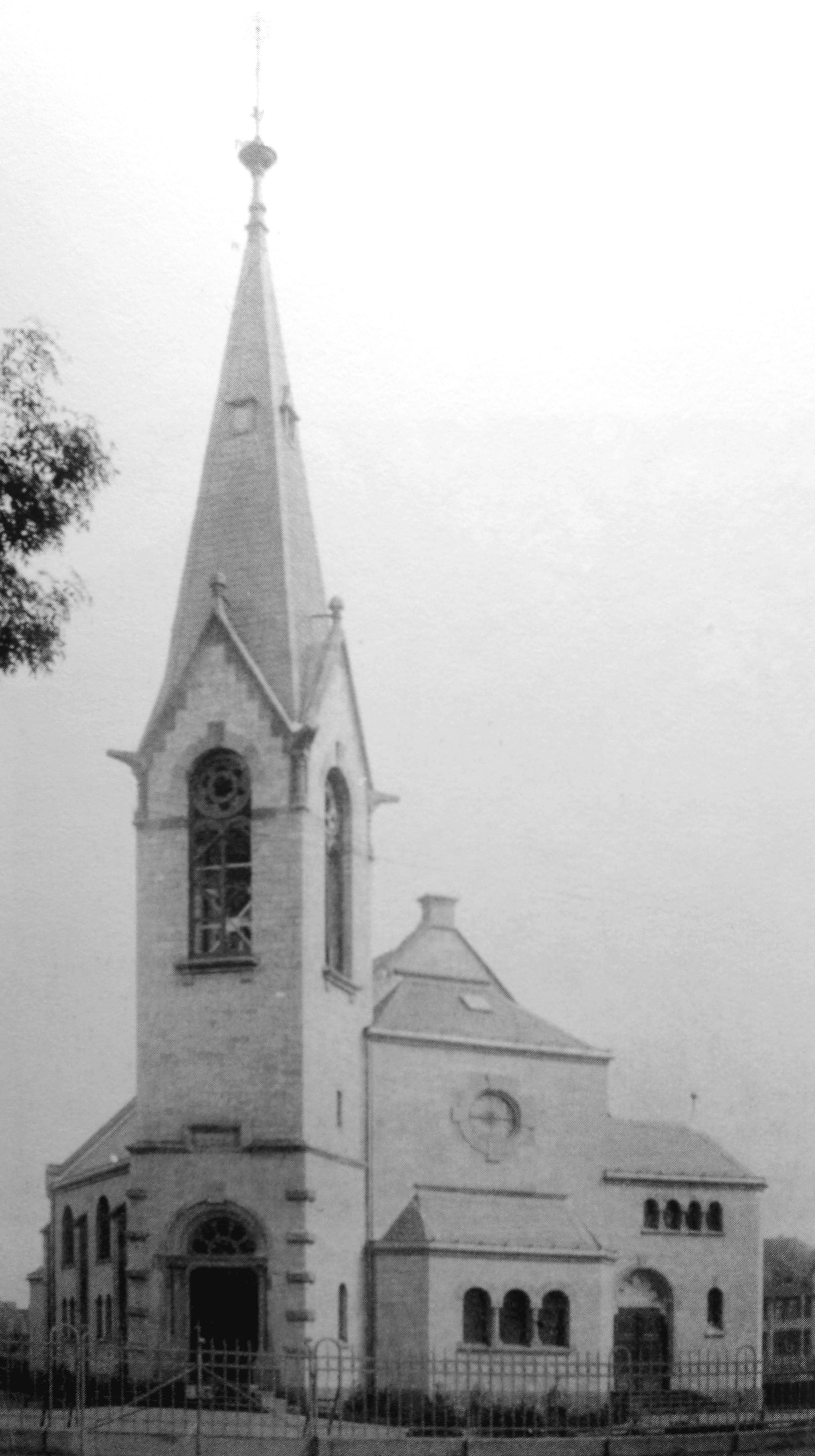 Evangelische Kirche Dillingen/Saar, nach der Einweihung im Jahr 1903 (Gemeindearchiv)